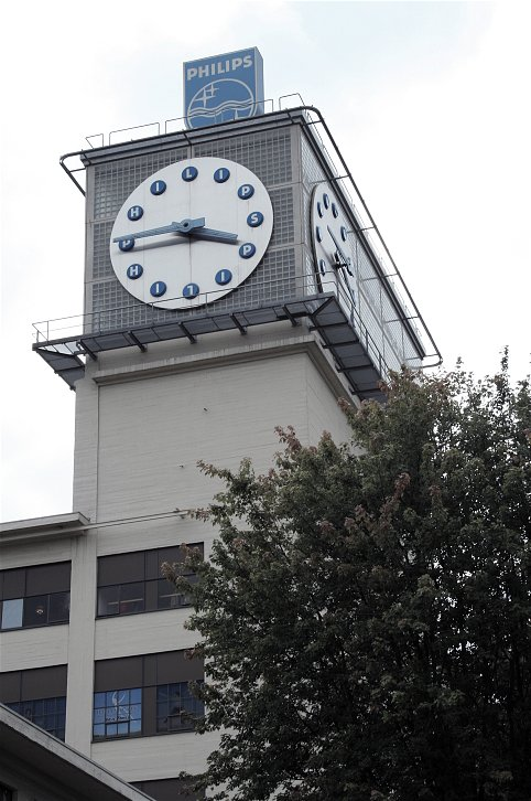 Strijp S, in Eindhoven; voormalig Philips fabrieken en kantoorgenbouwen